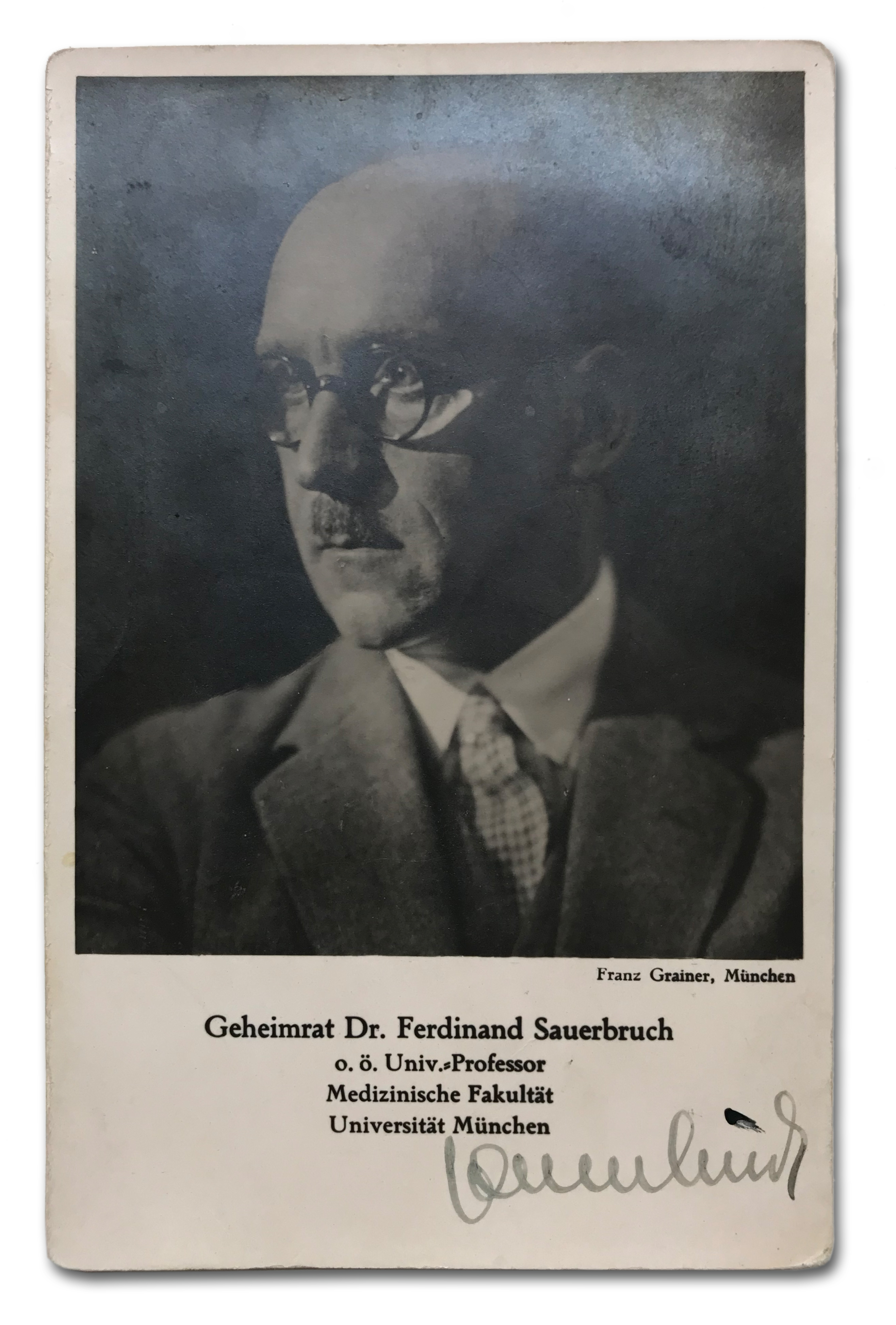 Selbst abfotografierte Bildpostkarte von Ferdinand Sauerbruch mit handschriftlicher Originalunterschrift.